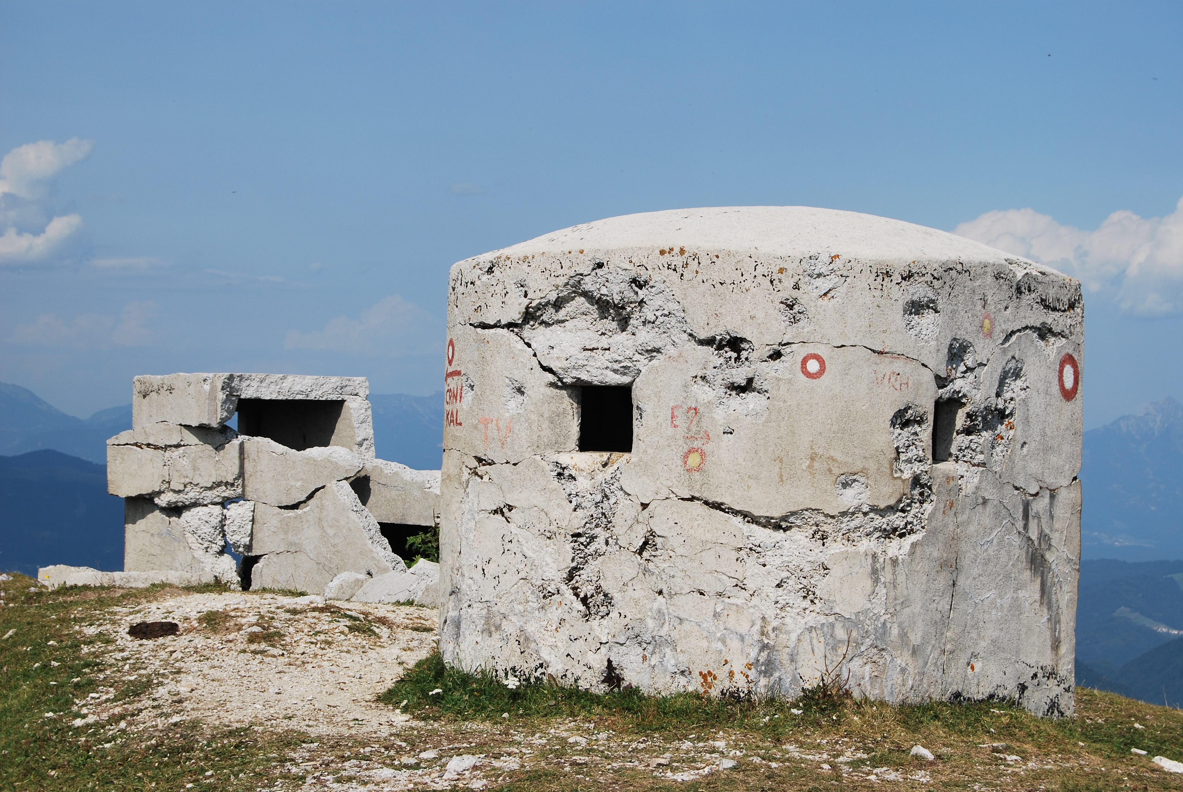 Pod vrhom Blegoša je Kraljevina Jugoslavija v času med obema svetovnima vojnama zgradila večje število bunkerjev, ki so varovali rapalsko mejo med Kraljevino Jugoslavijo in Kraljevino Italijo.